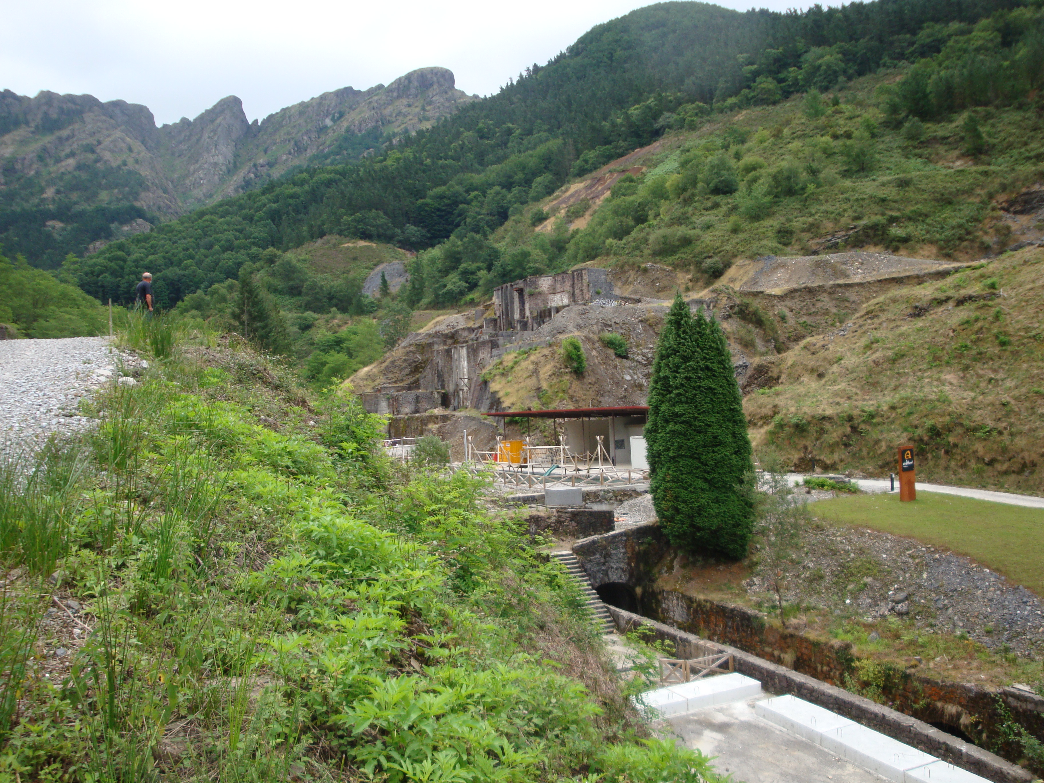 Arditurriko meatzeak, Oiartzun (Gipuzkoa). Atzean Aiako Harria. 2009ko uztailaren 19a.